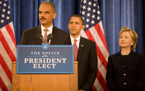 Obama-Biden Transition